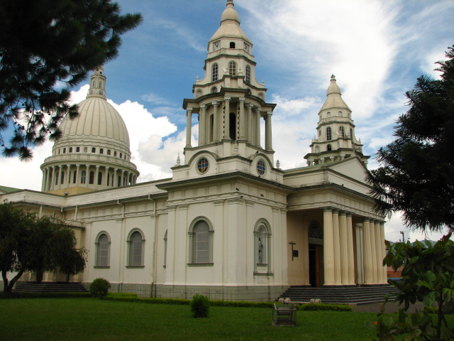 Iglesia Católica de Desamparados Iglesia de Desamparados (Church of Desamparados [the Abandoned])